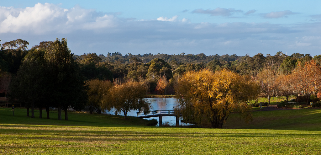 Fagen Park